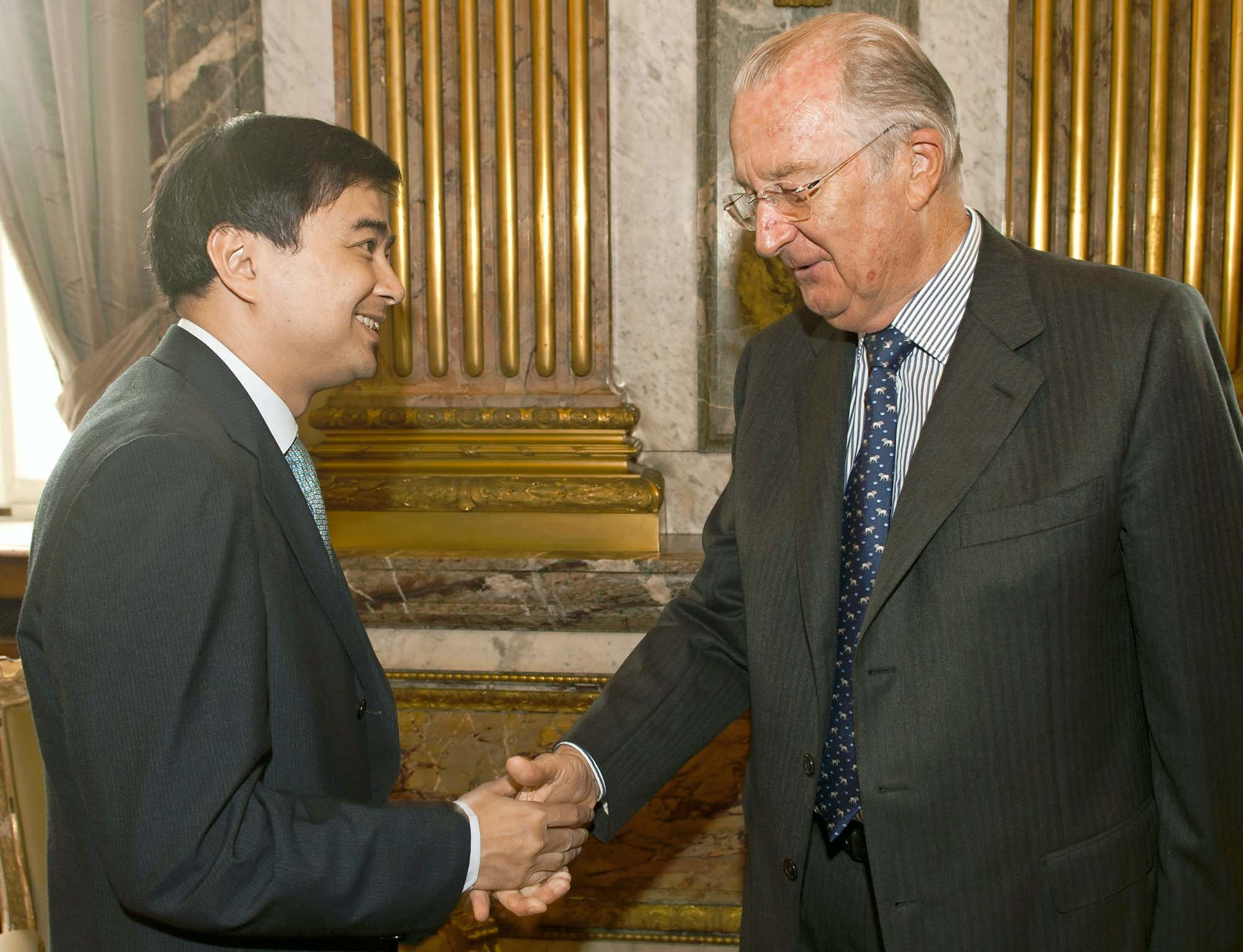 20101005 - BRUSSELS, BELGIUM : Belgian King Albert II (R) talks to Thailand Prime Minister Vejjajiva Abhisit (L) on the second day of the eighth Asia-Europe Meeting (ASEM 8), Tuesday 05 October 2010, at the Royal Palace in Brussels. นายกรัฐมนตรีเข้าร่วมการประชุมผู้นำเอเซีย-ยุโรป ครั้งที่8 (ASEM8) ณ กรุงบรัสเซลส์ ประเทศเบลเยียม วันที่4 -5 ตุลาคม พ.ศ.2553 (ภาพจาก